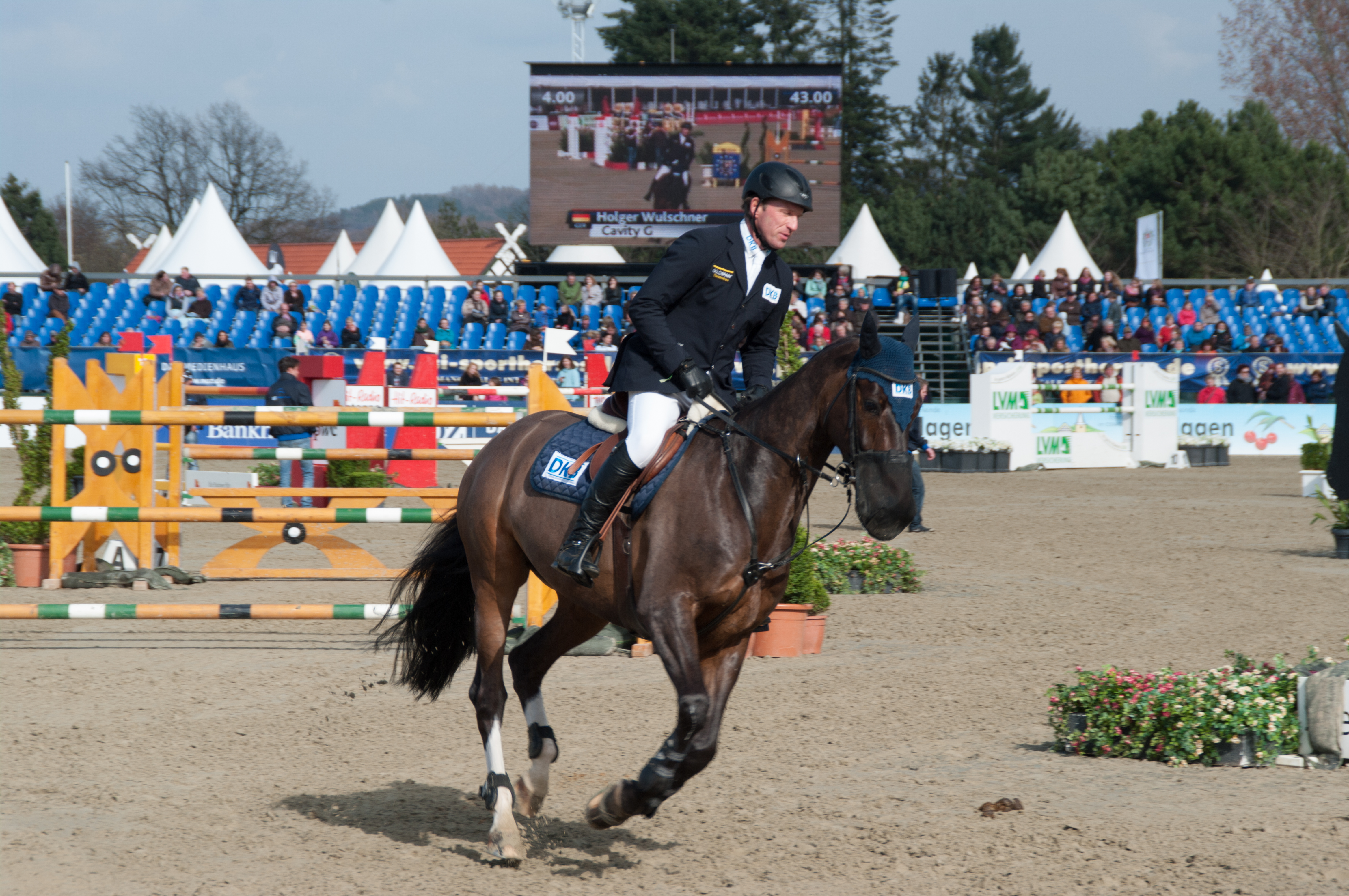 Horses & Dreams 2013: Holger Wulschner mit Cavity G